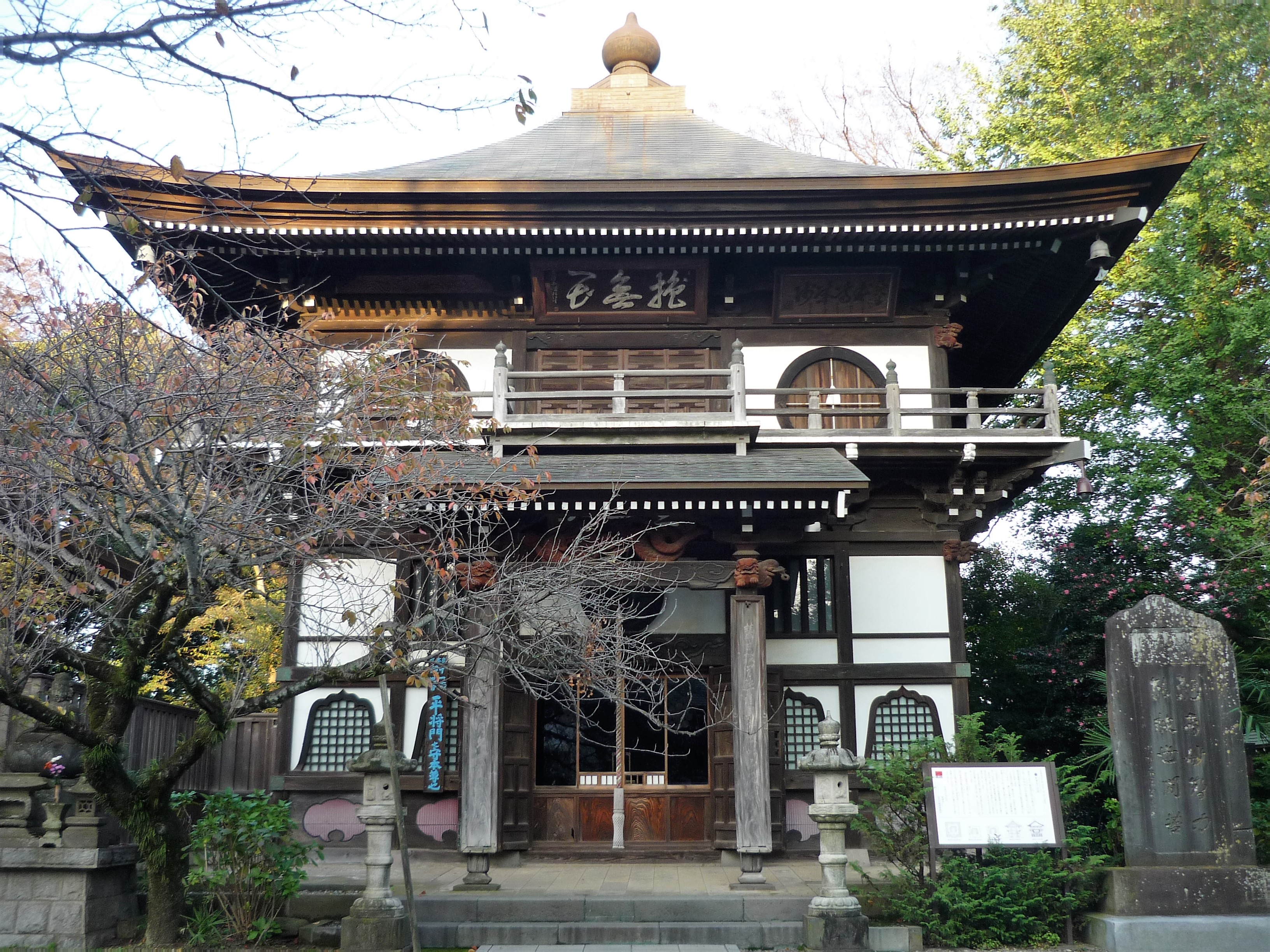 長禅寺（取手市取手）三世堂 Panasonic Lumix DMC-FS3